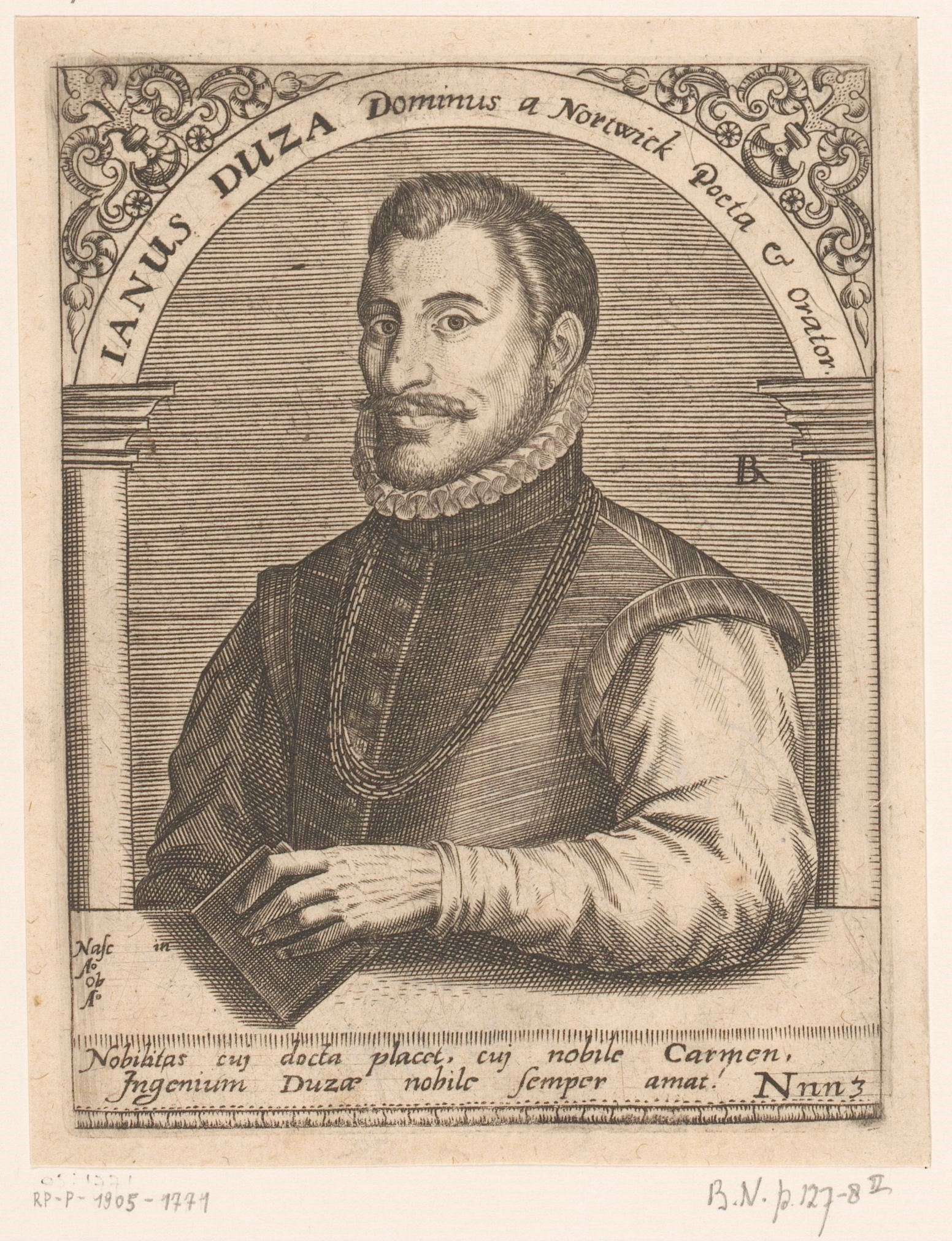 IdentificatieTitel(s): Portret van Janus DousaJanus Duza Dominus a Nortwick Poeta & Orator. (titel op object)Serie portretten van vijftiende- en zestiende-eeuwse geleerden (serietitel)Objecttype: prent Objectnummer: RP-P-1905-1771Opschriften / Merken: verzamelaarsmerk, verso, gestempeld: Lugt 2228Omschrijving: Rechtsonder genummerd Nnn3.VervaardigingVervaardiger: prentmaker: Robert Boissard (vermeld op object)prentmaker: Johann Theodor de Bry (verworpen toeschrijving)Plaats vervaardiging: FrankrijkDatering: 1597 - ca. 1599Materiaal: papier Techniek: graveren (drukprocedé)Afmetingen: plaatrand: h 138 mm × b 107 mmToelichtingMogelijk prent uit: Boissard, Jean-Jacques; Bry, Theodoor de; e.a. Bibliotheca sive thesaurus virtutis et gloriae in quo continentur illustrium eruditione et doctrina virorum effigies et vitae (...). Frankfurt: Guilielmi Fitzeri, 1628.OnderwerpWat: historical personsbookWie: Janus Dousa (jr.)Verwerving en rechtenVerwerving: aankoop 1905Copyright: Publiek domein